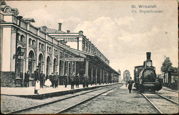 Почтовая открытка с видом станции Вержболово. Всемiрный Почтовый Союзъ. Россiя.